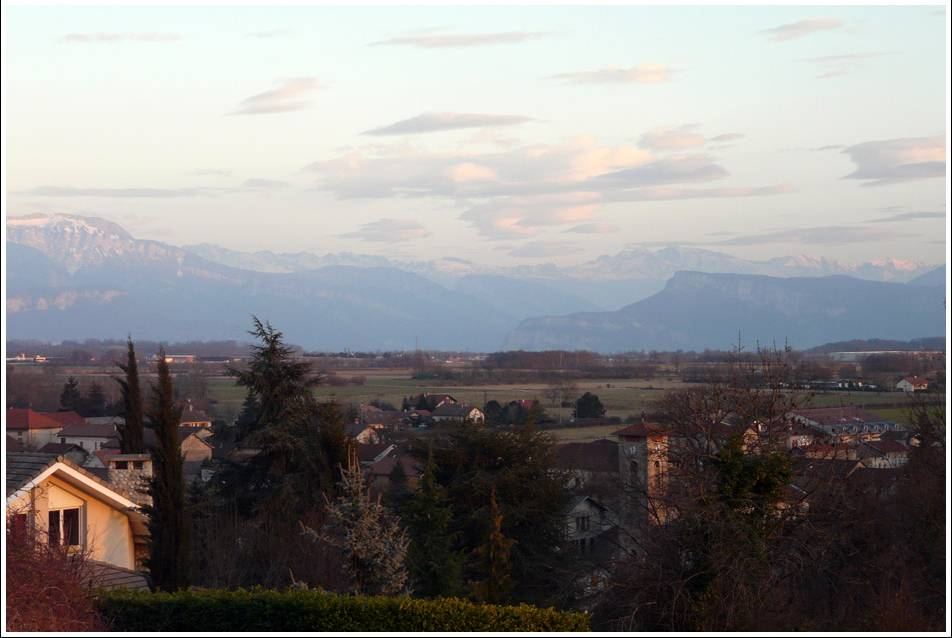 Vue du village de Colombe